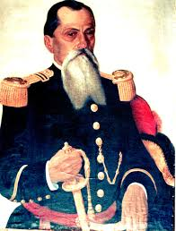 Mariano Lino Morales De Los Reyes